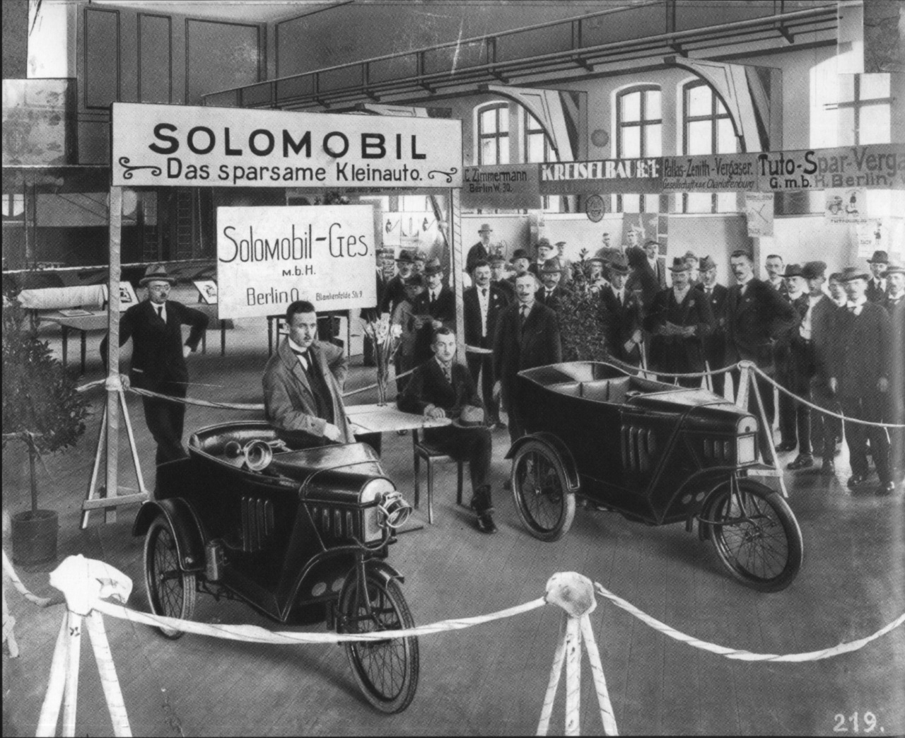 Messestand der Solomobil GmbH aus Berlin in der Turnhalle am Frankfurter Tor (Kriegsverlust) zur Herbstmesse 1919 in Leipzig.